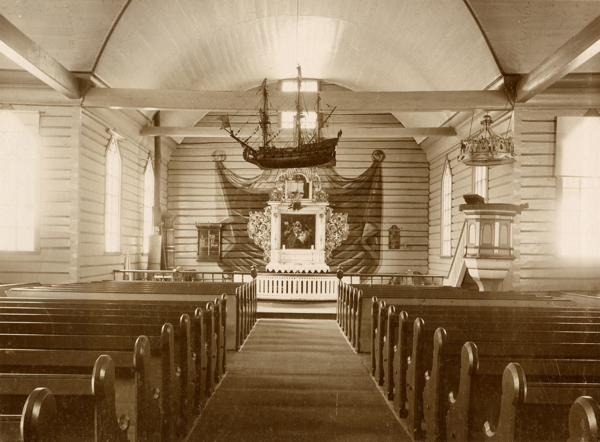 Interiør i Dypvåg kirke. Foto: Christian Christensen Thomhav, fra Kutlurminnebilder.no.